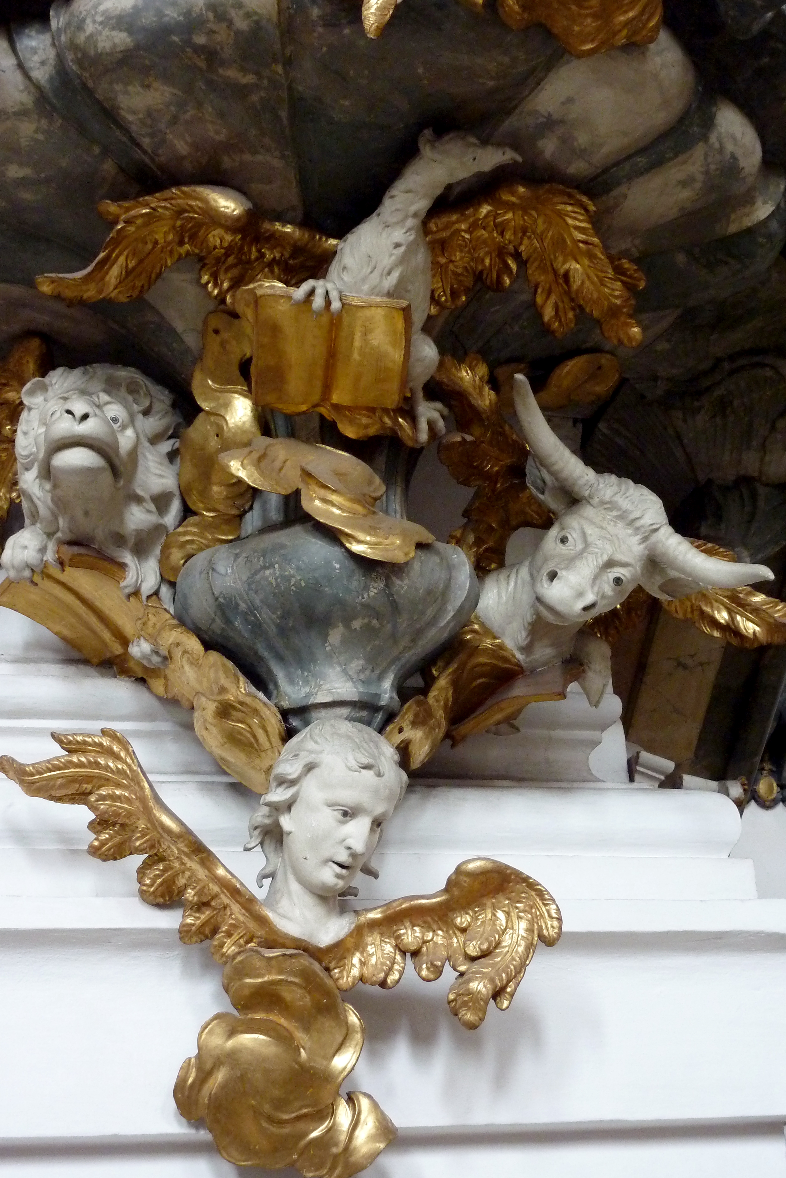 Studienkirche Mariä Himmelfahrt in Dillingen an der Donau, Kanzel von dem Bildhauer Johann Michael Fischer, Kanzelfuß mit den Symbolen der Evangelisten